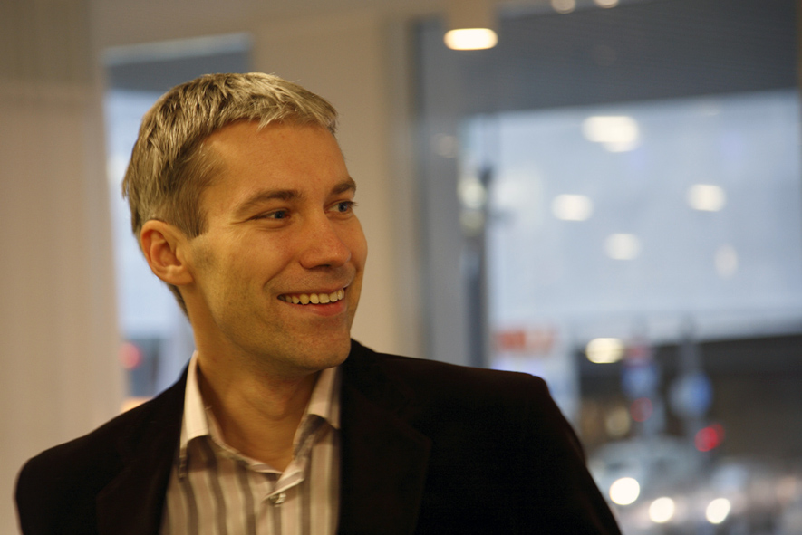 Indrek Allmann